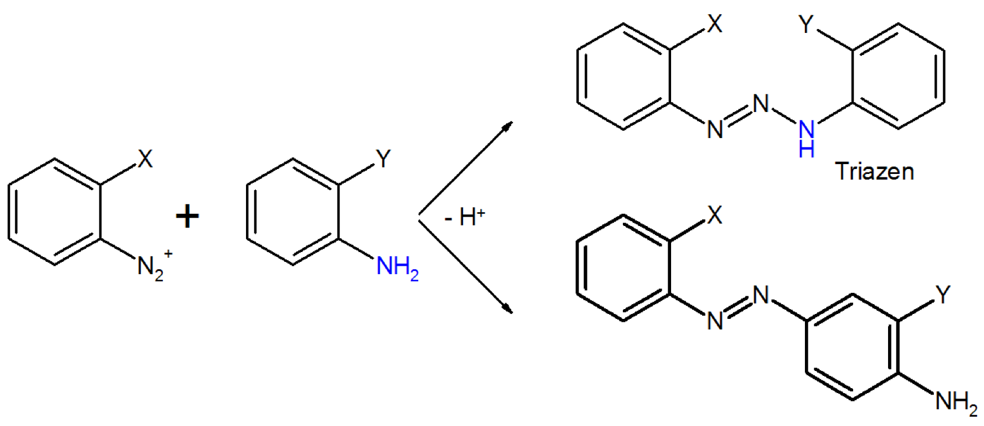 Triazenbildung